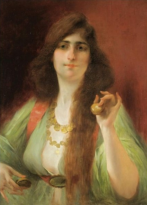 Jeune femme aux castagnettes